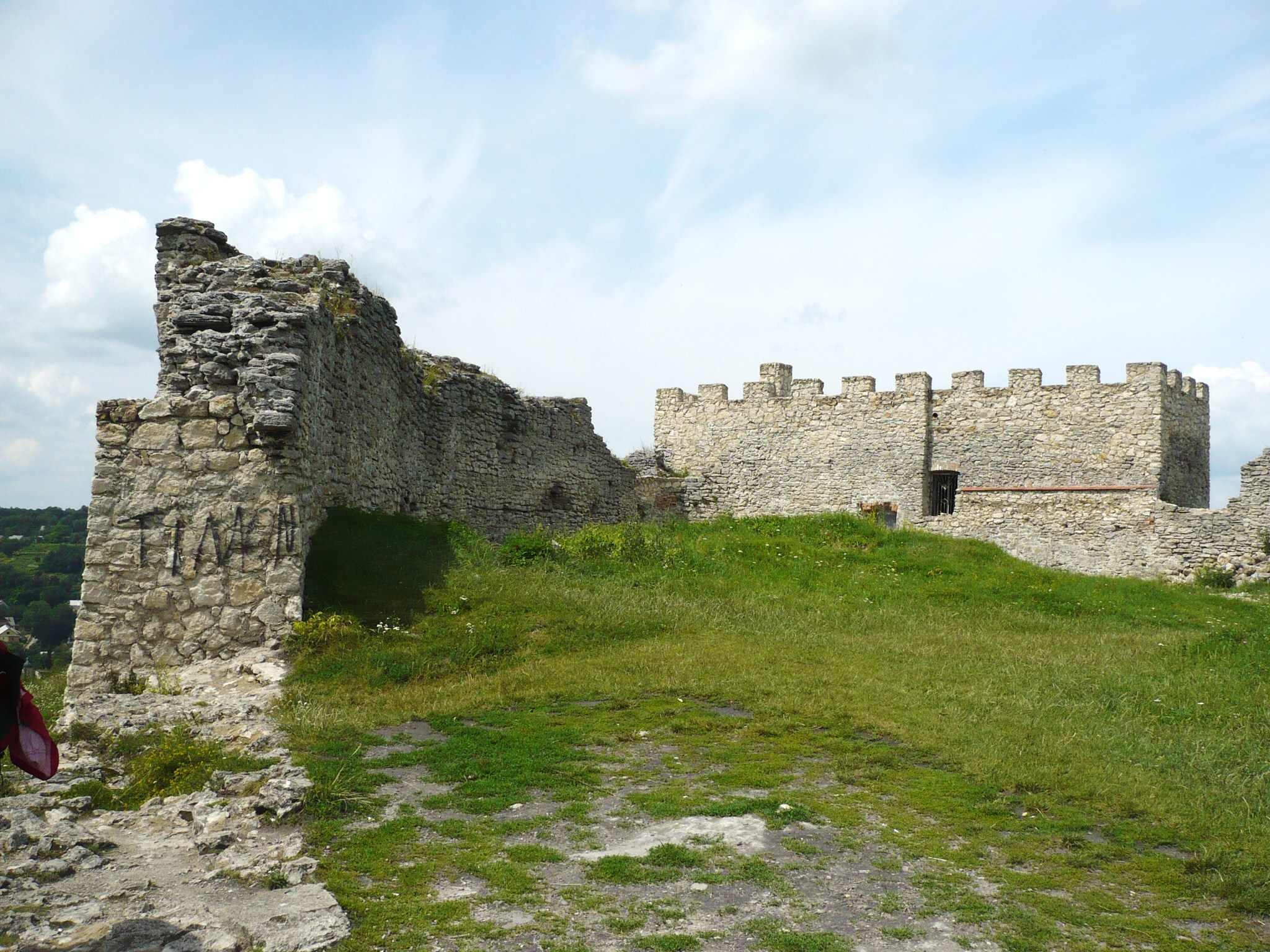 Zamek w Krzemieńcu